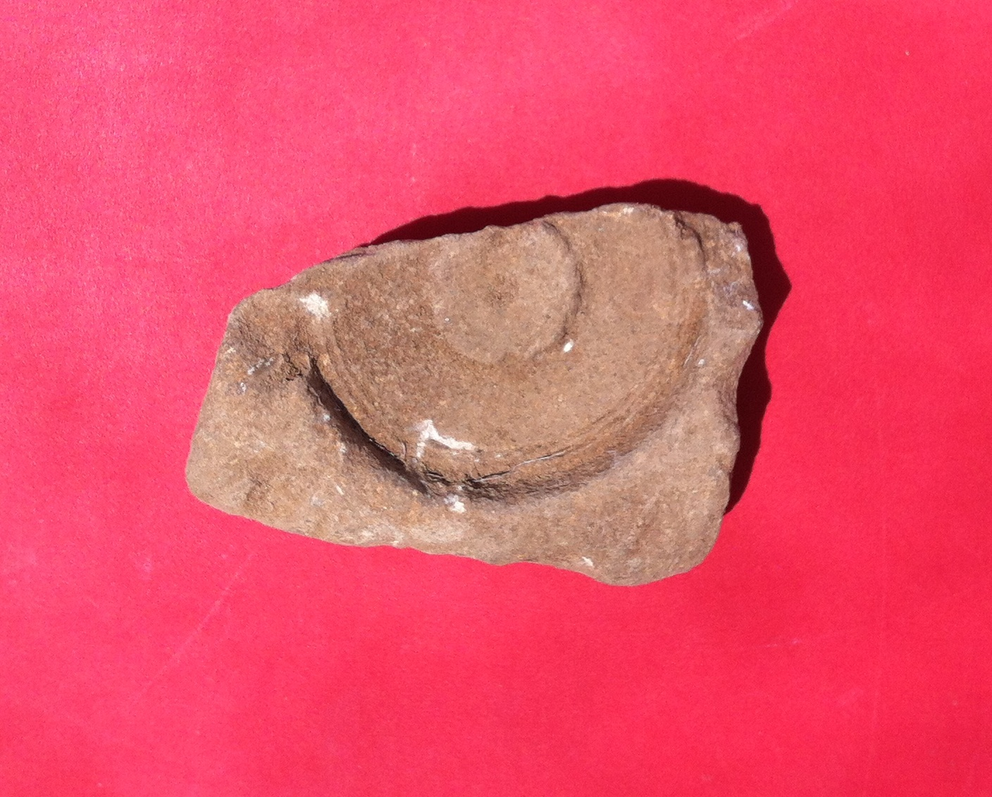 שיחין היה יישוב עתיק מתקופת בית שני והתלמוד ששכן ליד ציפורי. בשנת 2012 החלו באתר חפירות ארכולוגיות שבר תבנית אבן להכנת נרות שמן מחרס